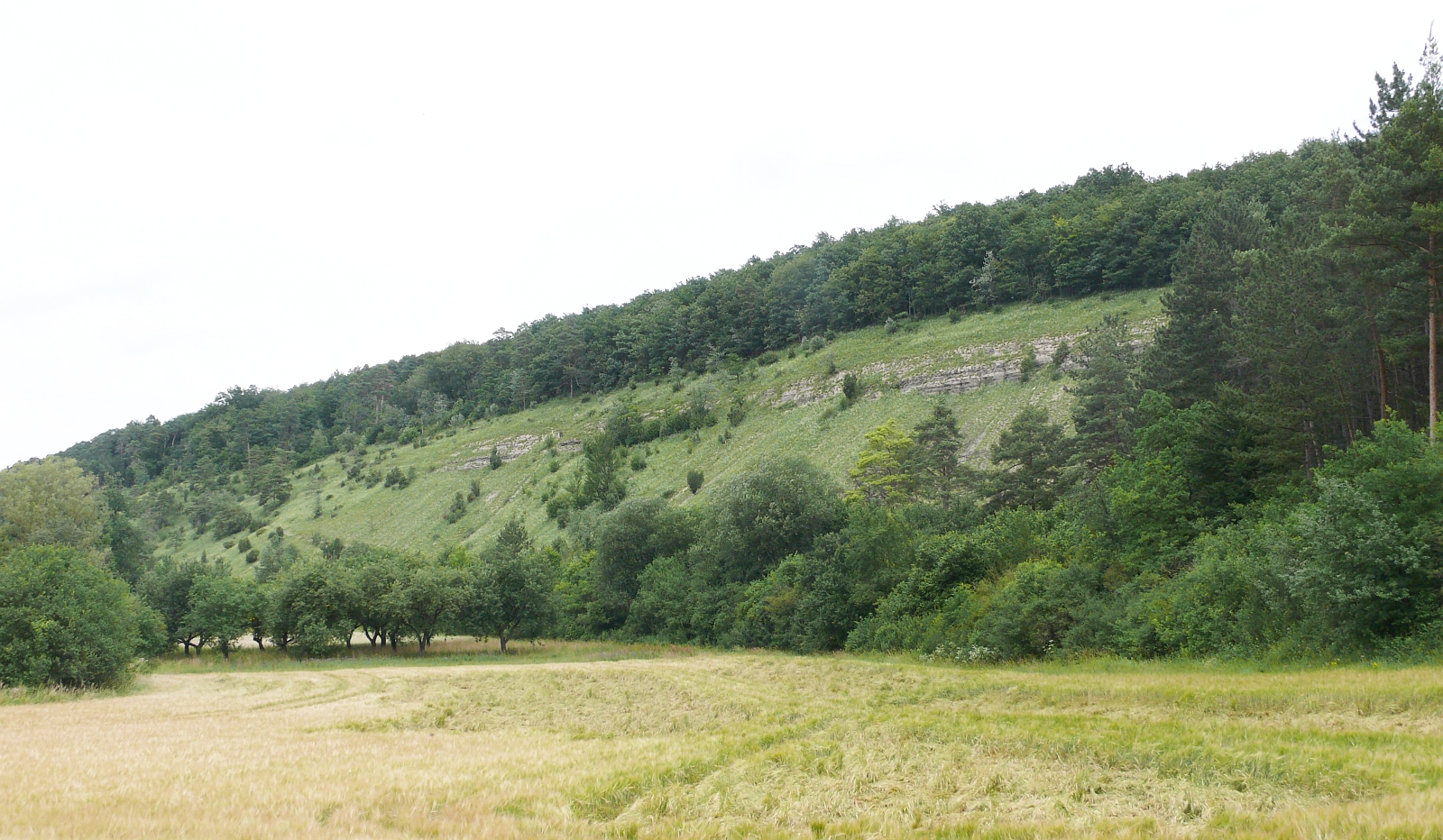 Teucrio-Seslerietum albicantis (Teucrio-Seslerietum variae) Naturschutzgebiet Stammberg bei Tauberbischofsheim während der Hochblüte von Anthericum ramoscum